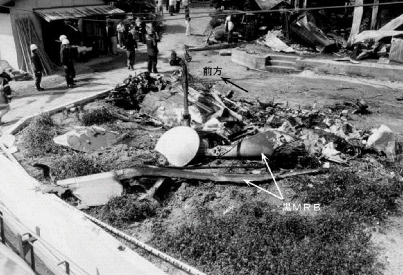 運輸安全委員会の報告書2002-8より